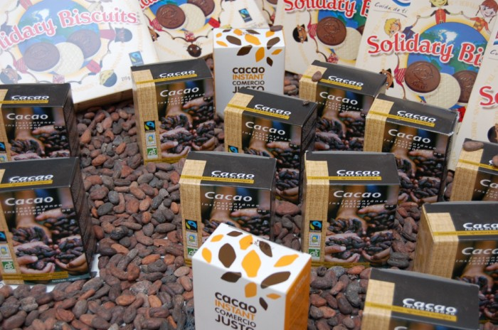 distintos cacao y galletas de Comercio Justo, certificados con el Sello FAIRTRADE-Comercio Justo. Parte una exposición sobre el tema